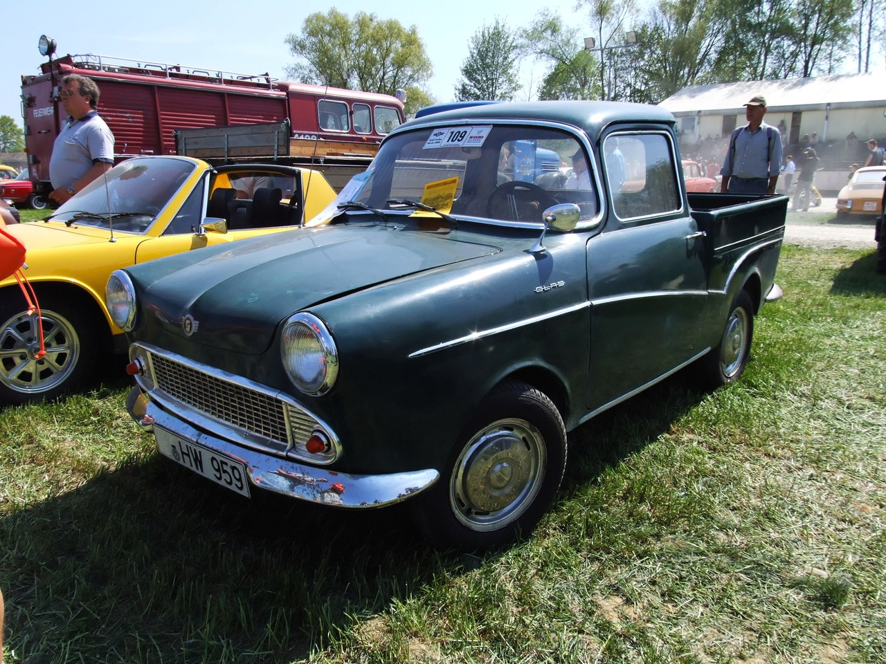 Quelle: selbst fotografiert, 04/2007 Fotograf: Späth Chr.